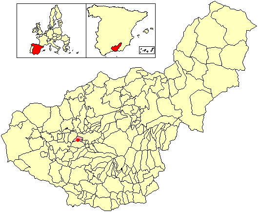 Situación de la localidad de El Ventorrillo (en los municipios de Cúllar Vega y Vegas del Genil) respecto a la provincia de Granada, en España.